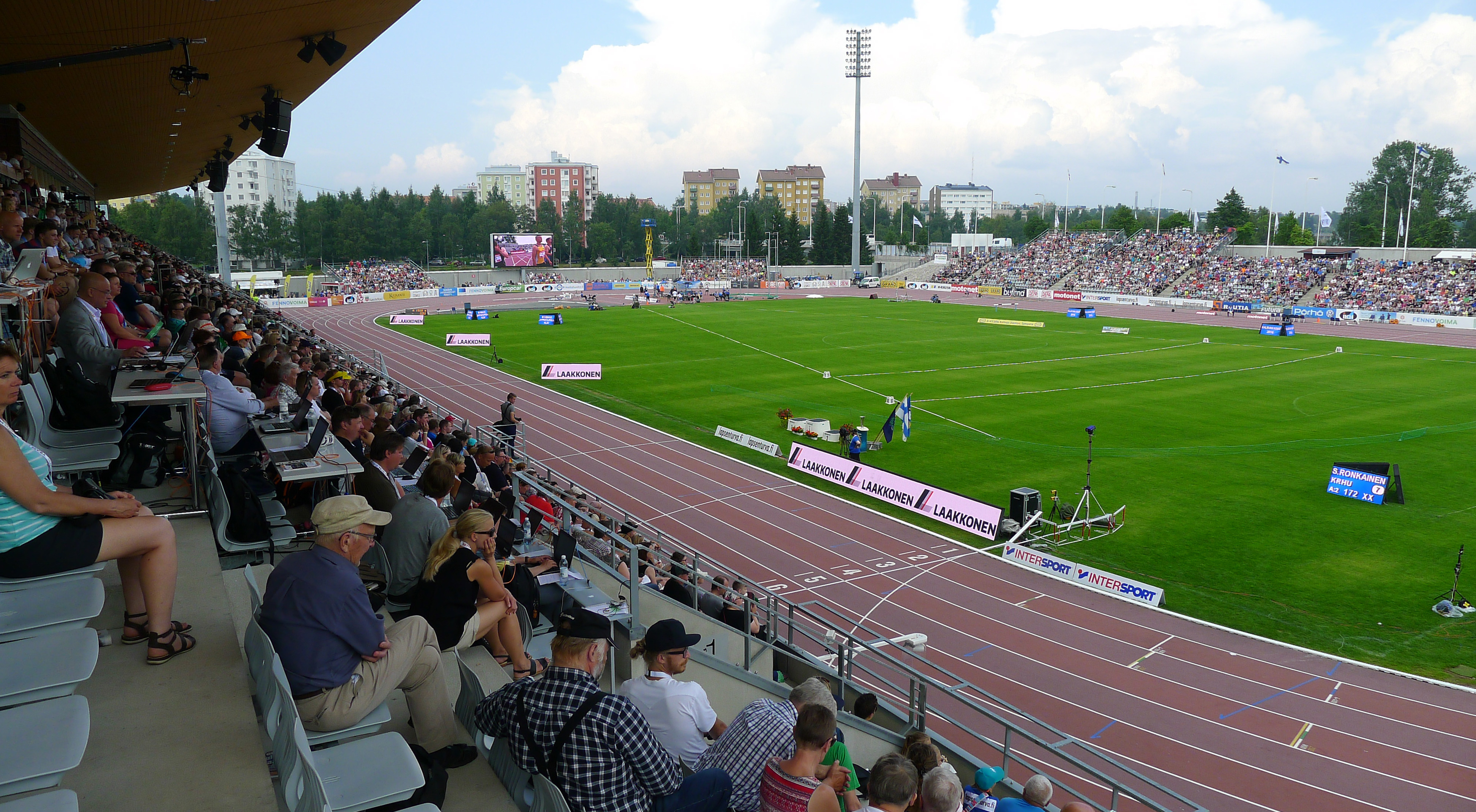 Kalevan kisat Raatin stadionilla Oulussa 24.7.2016